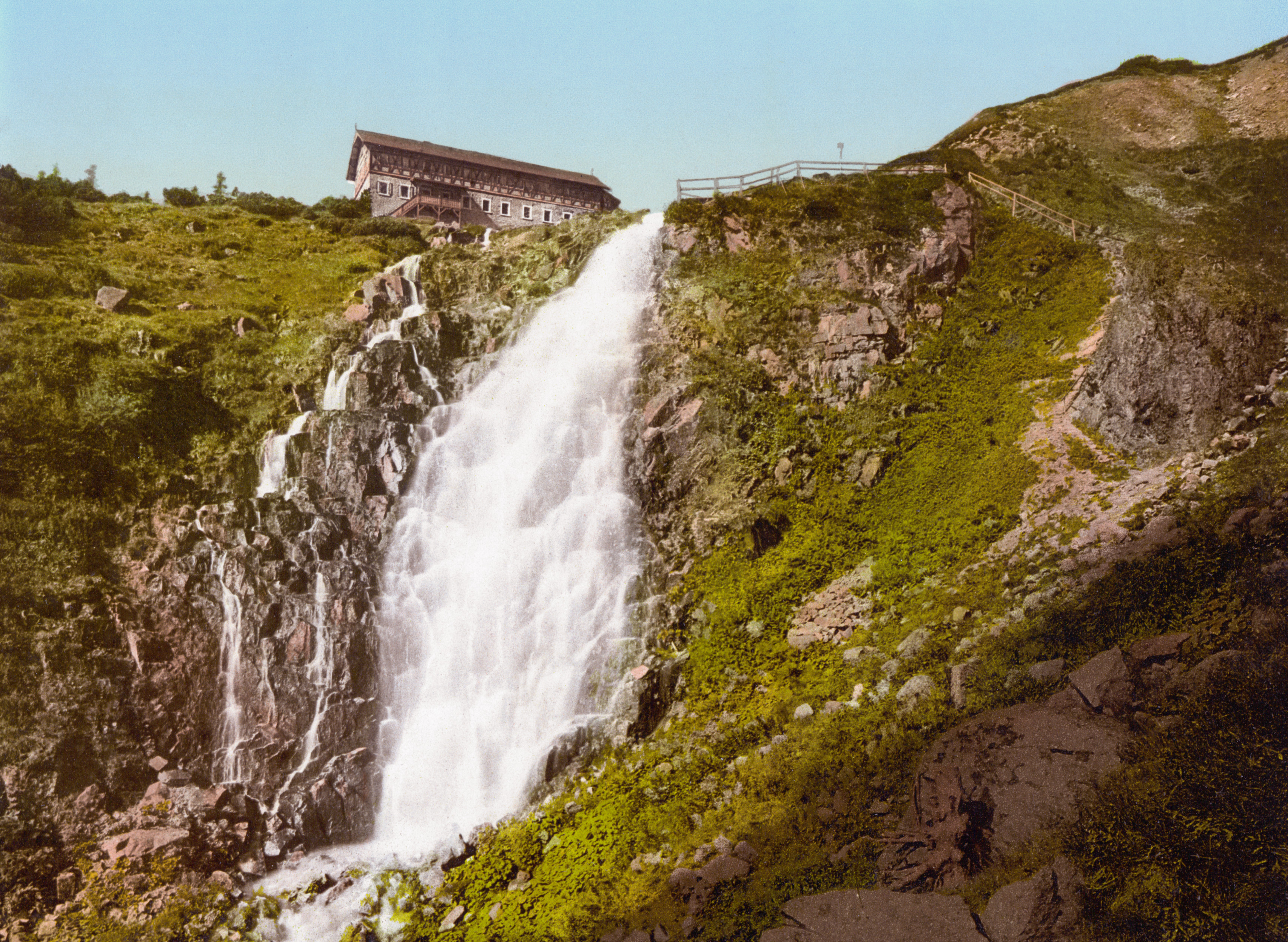 Labský vodopád kolem roku 1900